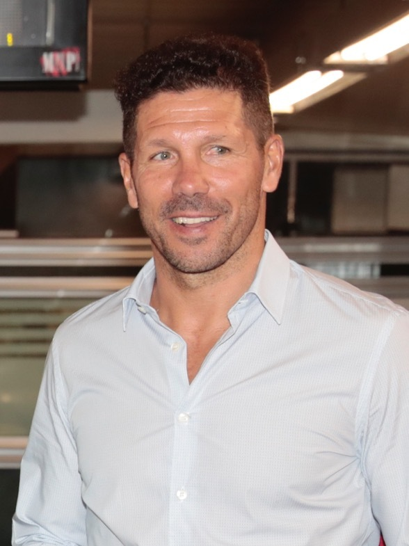 La estación de Estadio Metropolitano está preparada para facilitar el desplazamiento a las miles de personas que asistirán el próximo día 16 al partido inaugural del nuevo feudo rojiblanco. Una estación en la que los seguidores del Atlético de Madrid se encontrarán como en su casa y podrán observar cómo la historia de Metro está ligada a la de los estadios de su equipo, admirar los diferentes escudos que ha lucido el Atlético de Madrid y disfrutar con la iluminación de los colores rojiblancos. ¡Aúpa Atleti!